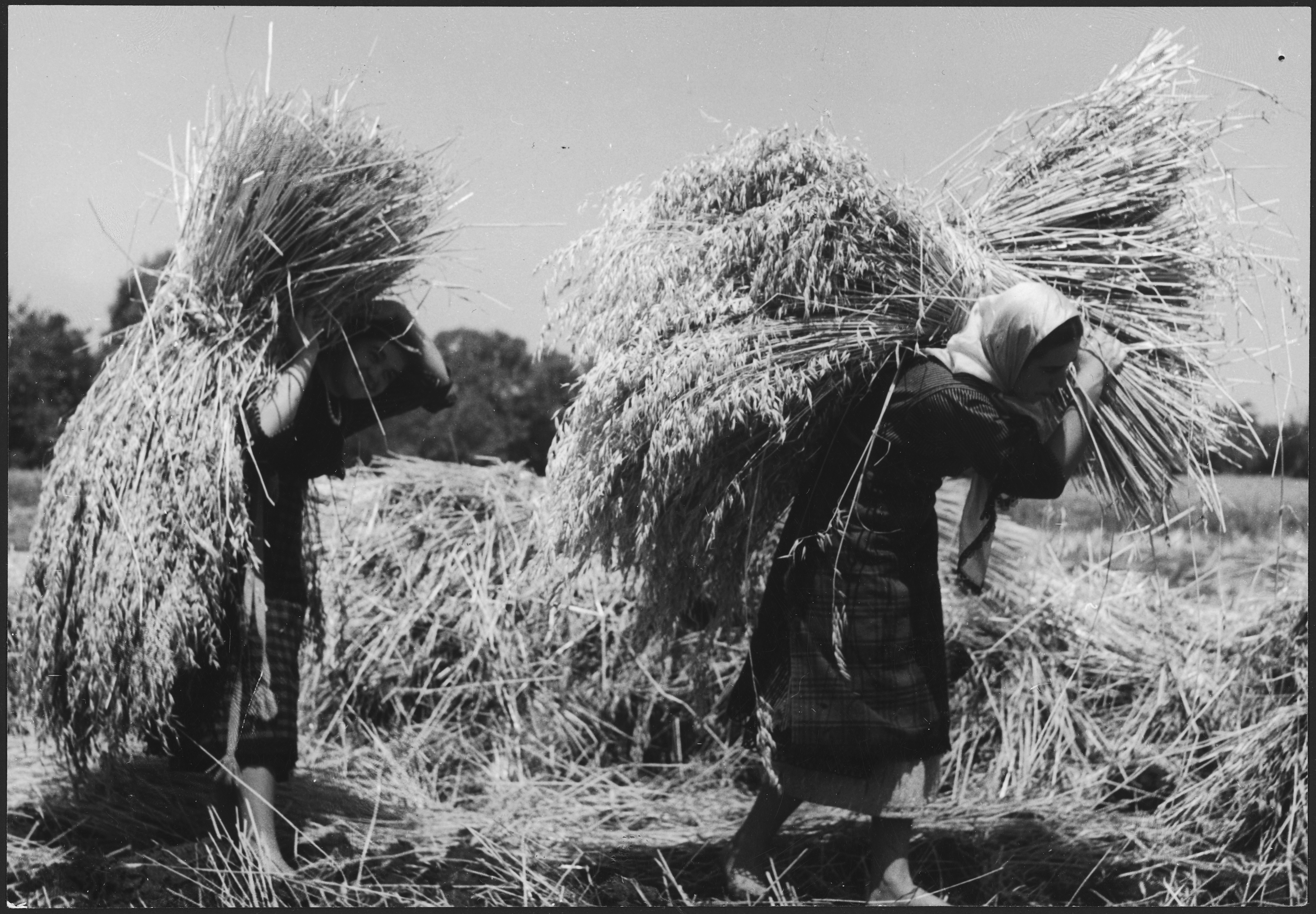 Bulgarien, Plovdiv (Plowdiw): Menschen; Frauen bei der Heuernte